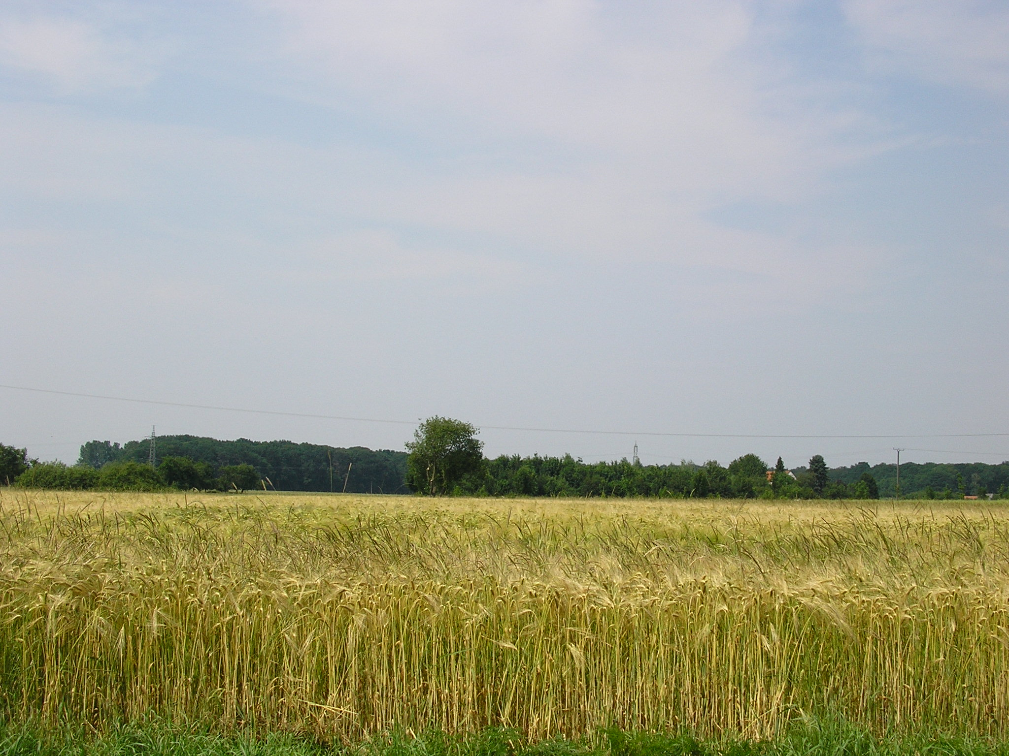 Das Hollwinkeler Holz bei Preußisch Oldendorf und Lübbecke, Kreis Minden-Lübbecke, Nordrhein-Westfalen. Blickrichtung nach Südosten.